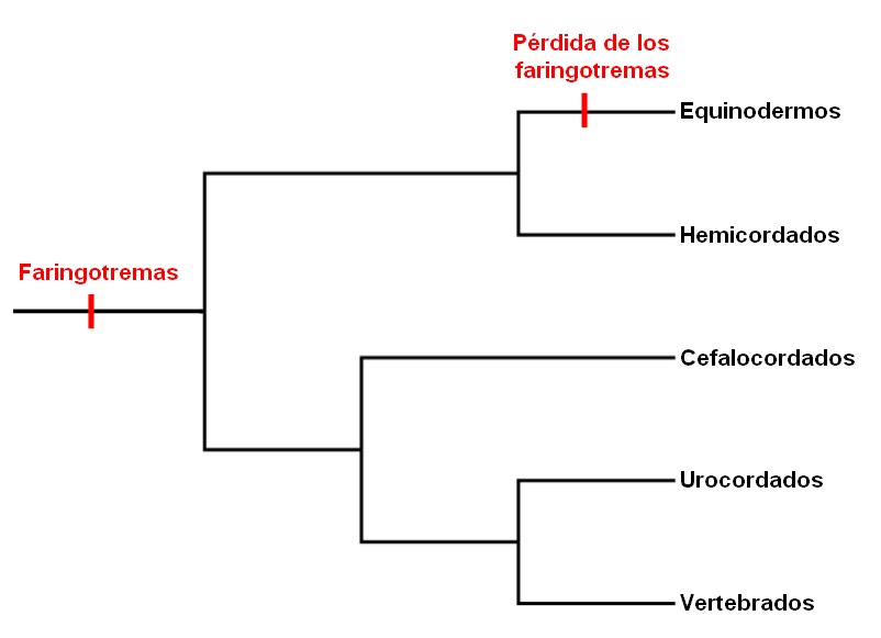 Faringotremas